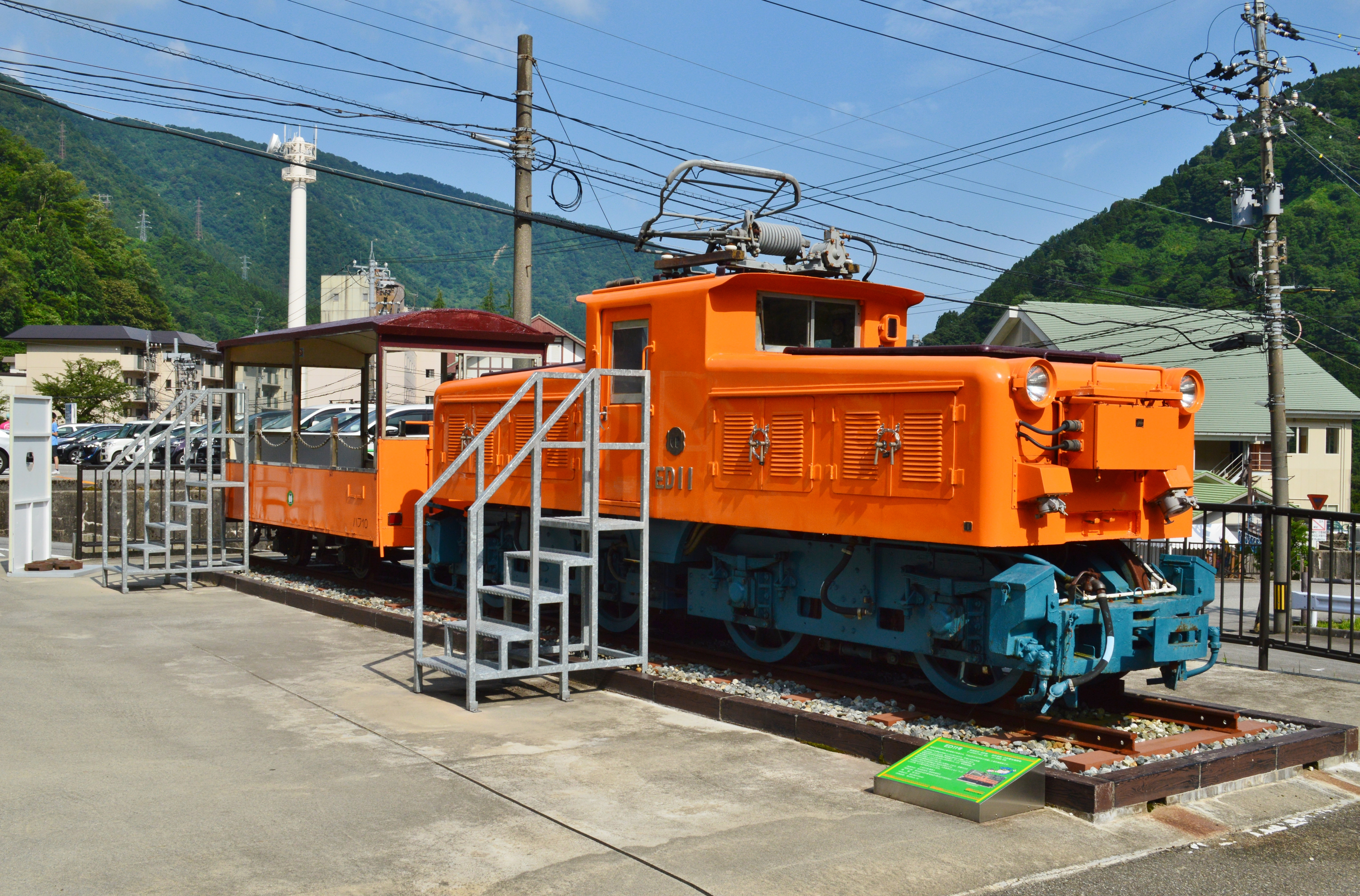 黒部峡谷鉄道 ED11 (宇奈月駅前にて)